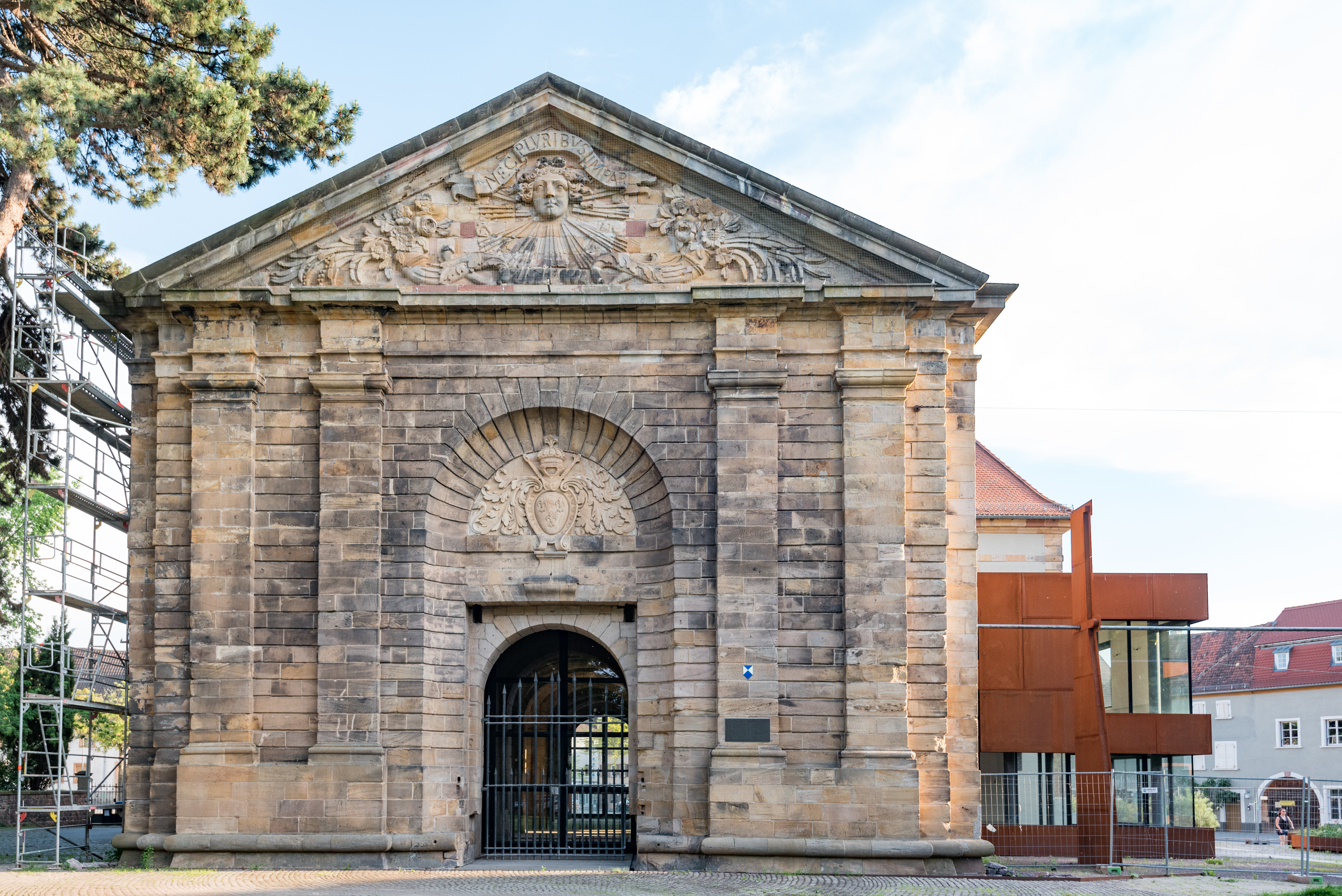 Landau in der Pfalz, Neustadter Straße 2, Deutsches Tor